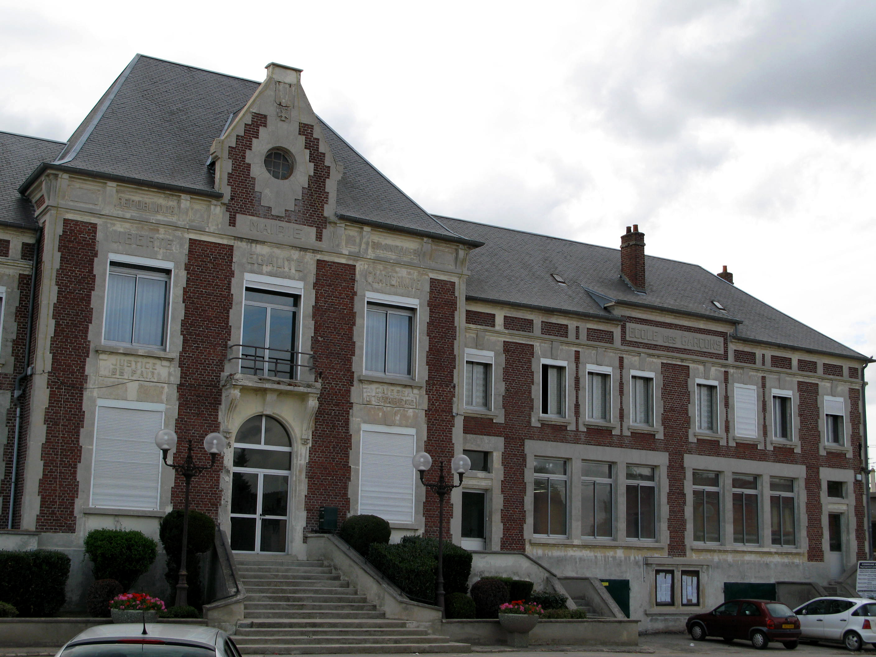 Combles (Somme, France) - La mairie-école.